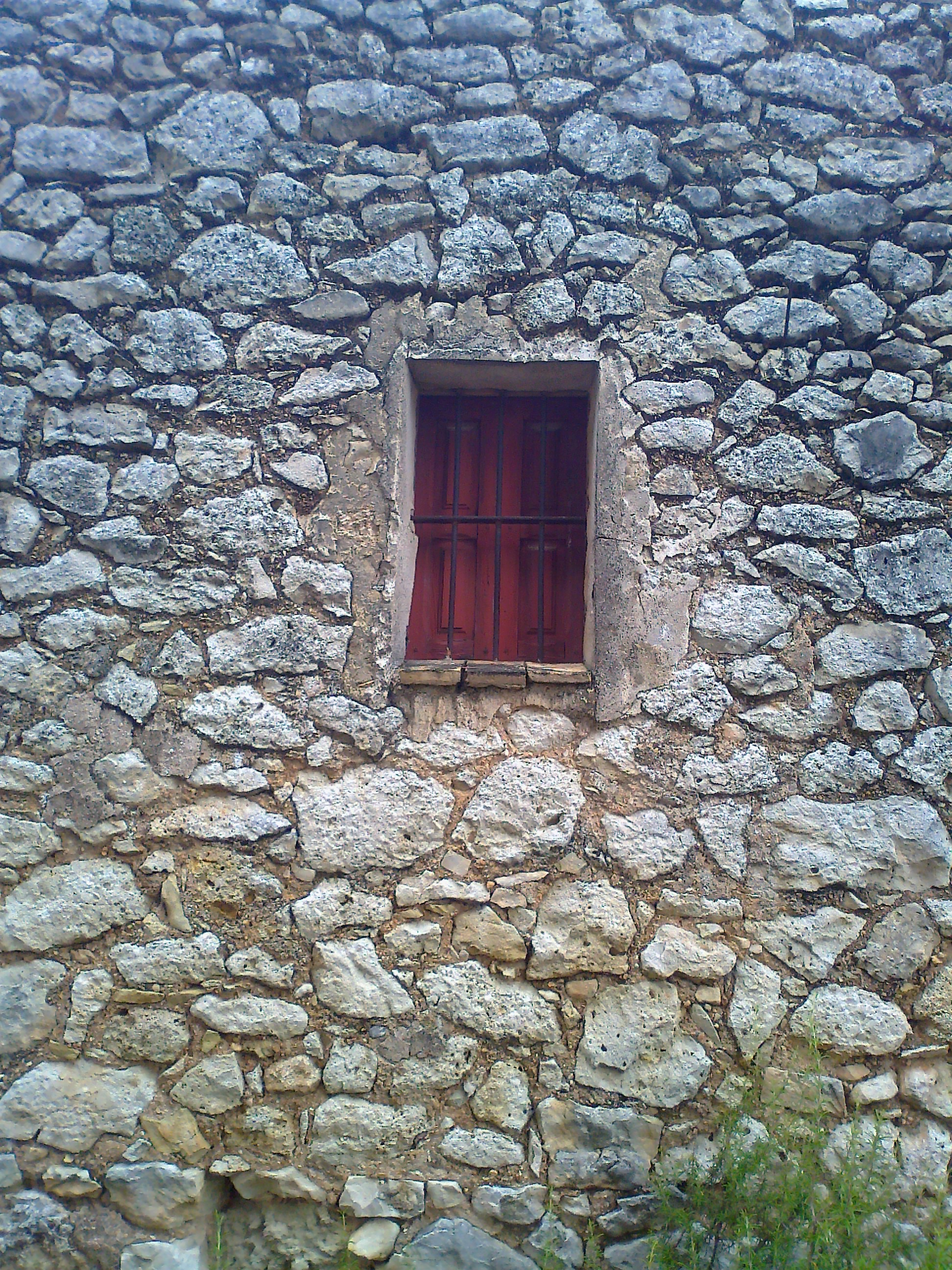 Detall de l'Ermita de Polop, Alcoy (Alacant).